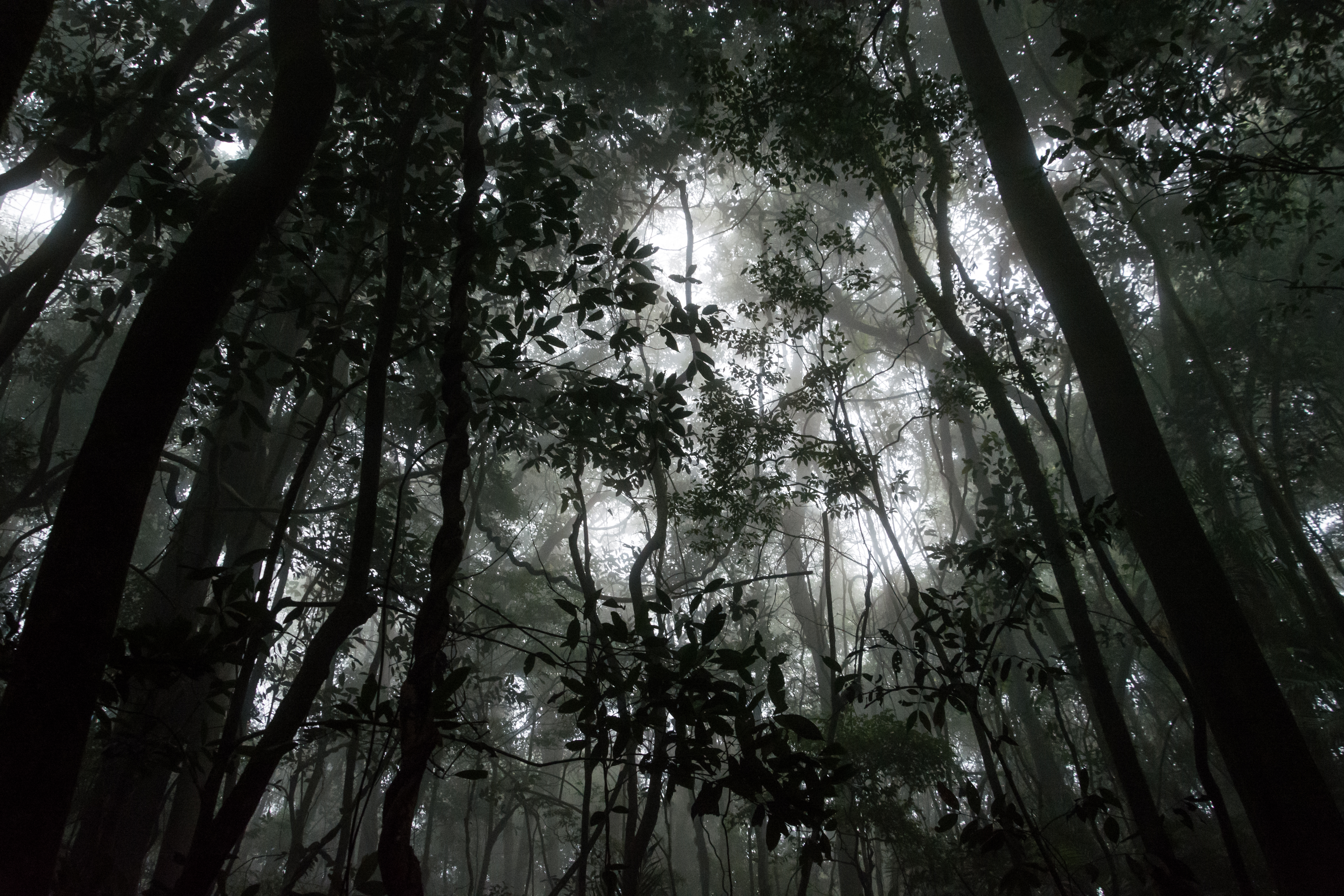 Floresta tropical na trilha do pico da Cocaina no Parque Nacional da Floresta da Tijuca